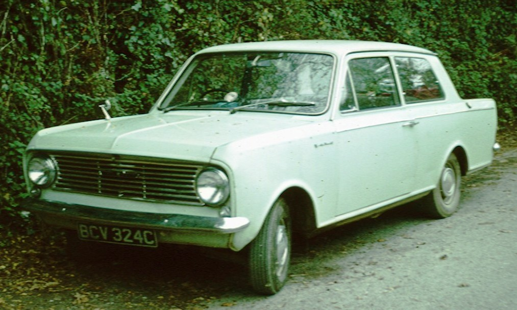 Vauxhall Viva HA 1965